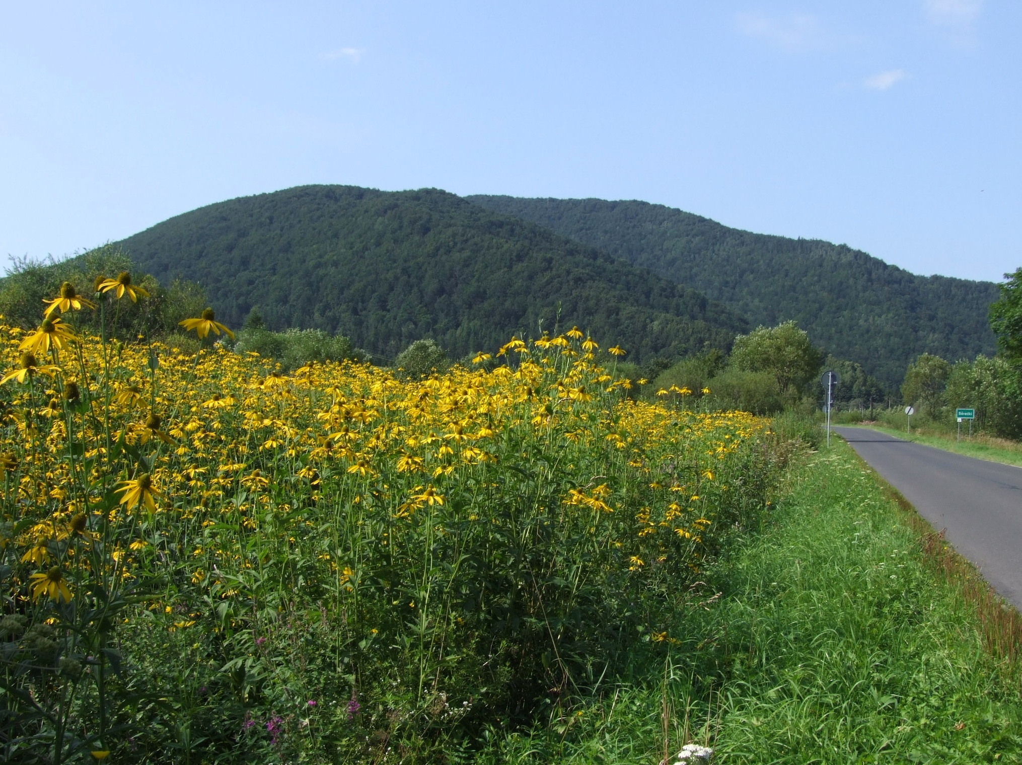 Magura Stuposiańska, widok z Bereżek